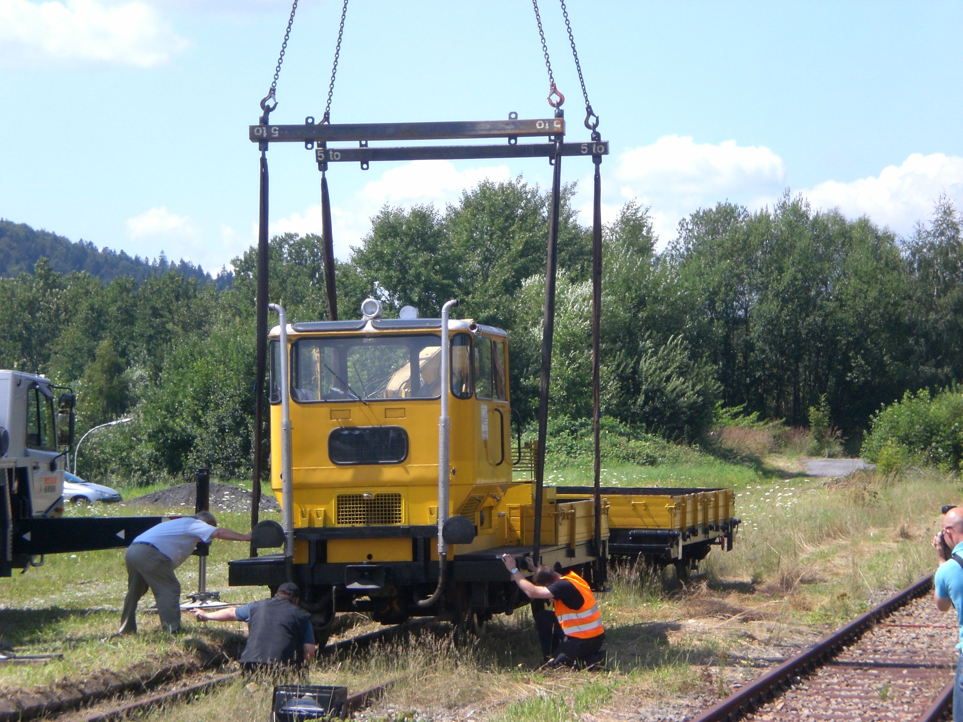 SKLIlztalbahn